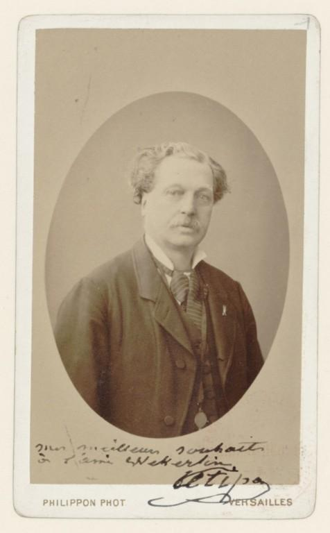 Lucien Petipa